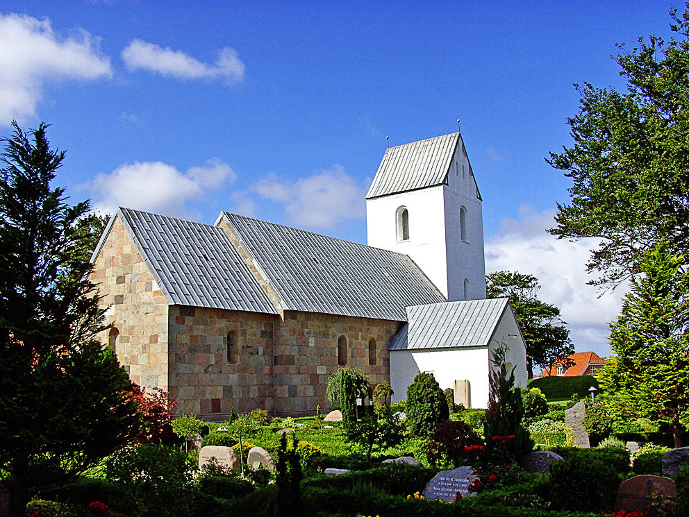 fra nordøst